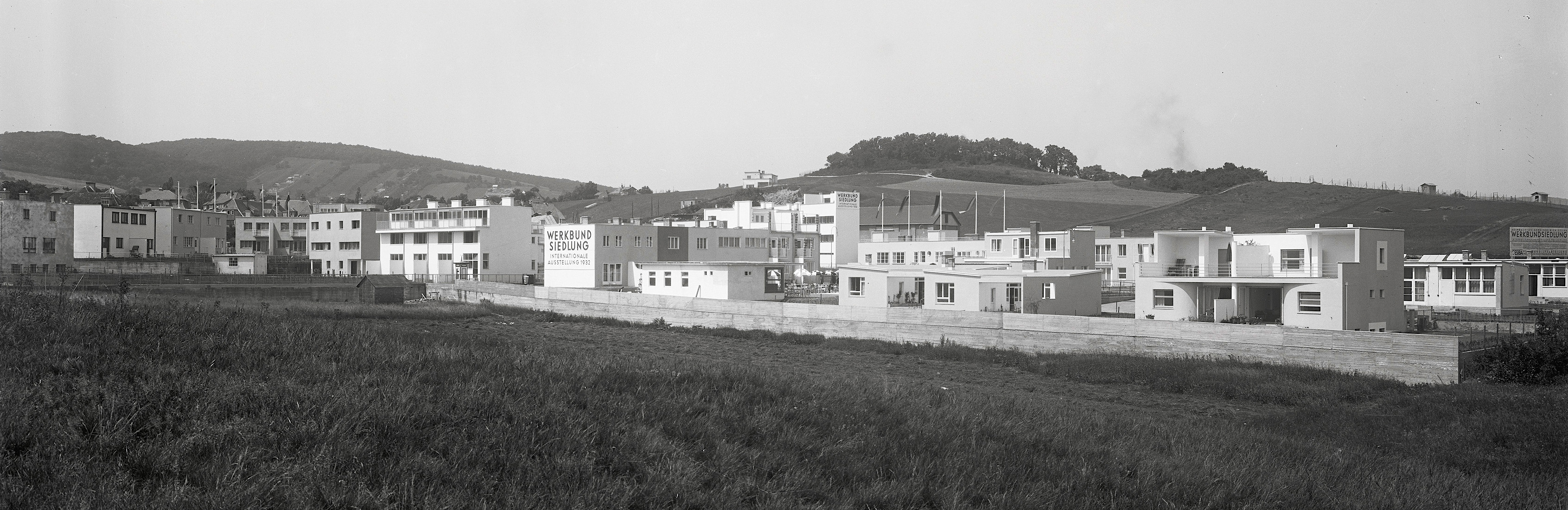 Werkbundsiedlung Wien Wiesenansicht